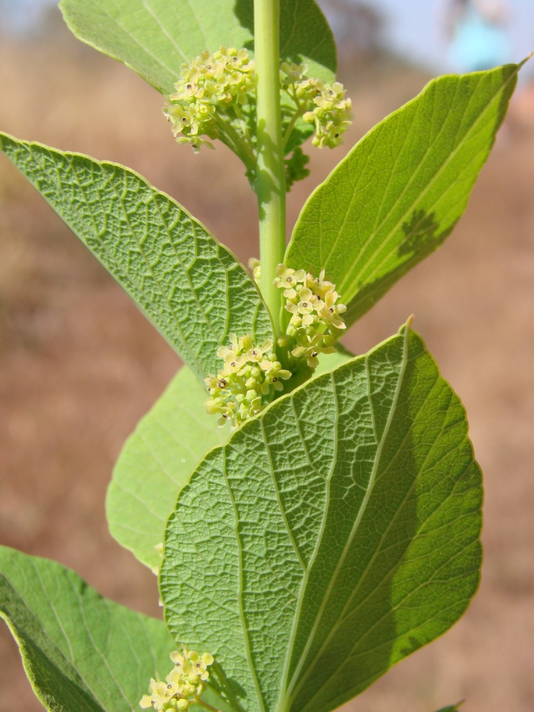 Cissampelos ovalifolia DC. - MENISPERMACEAE - Jardim Botânico de Brasília - Distrito Federal - Brasil.